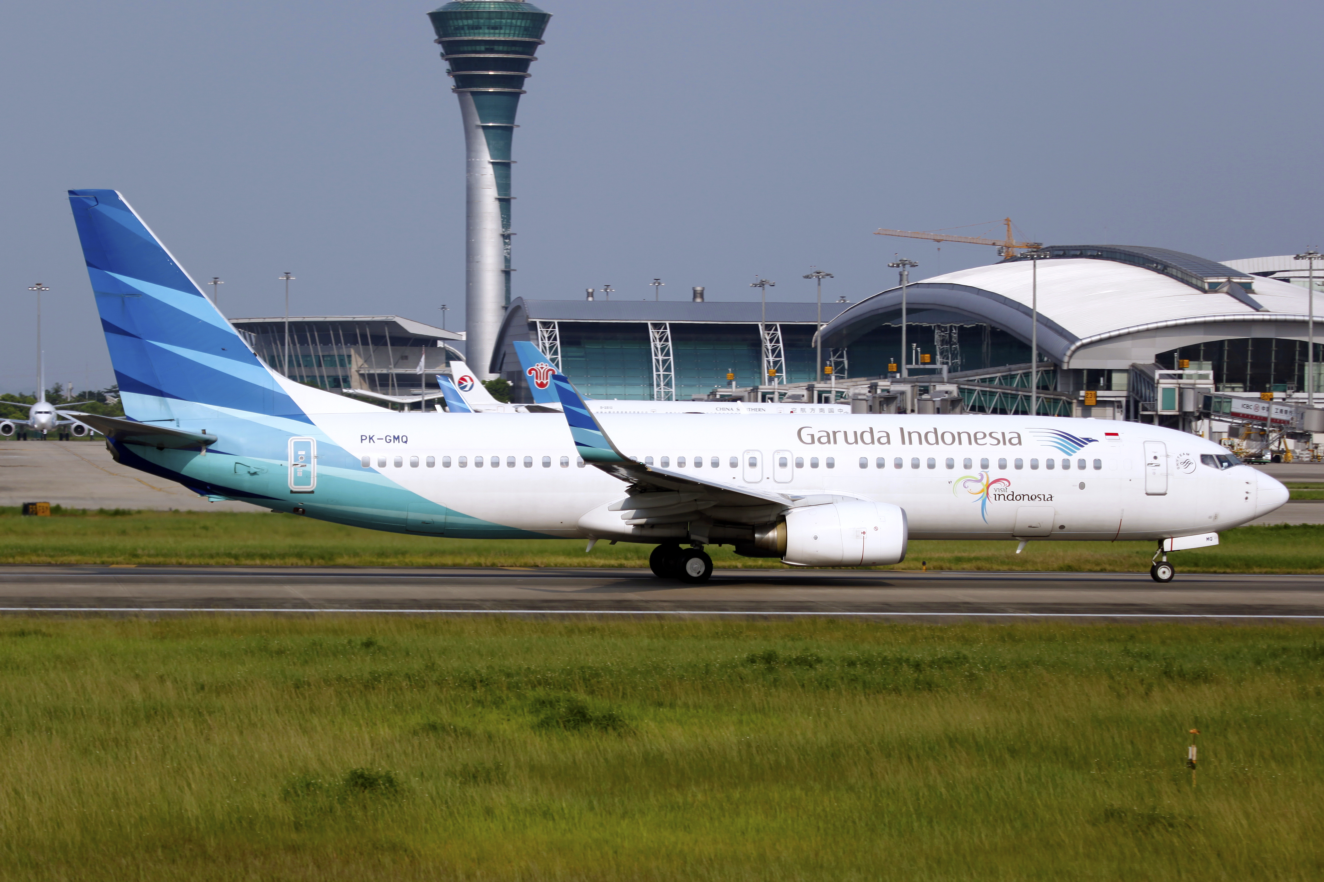 PK-GMQ | Garuda Indonesia | Boeing 737-8U3(WL) | Guangzhou Baiyun International Airport [CAN]